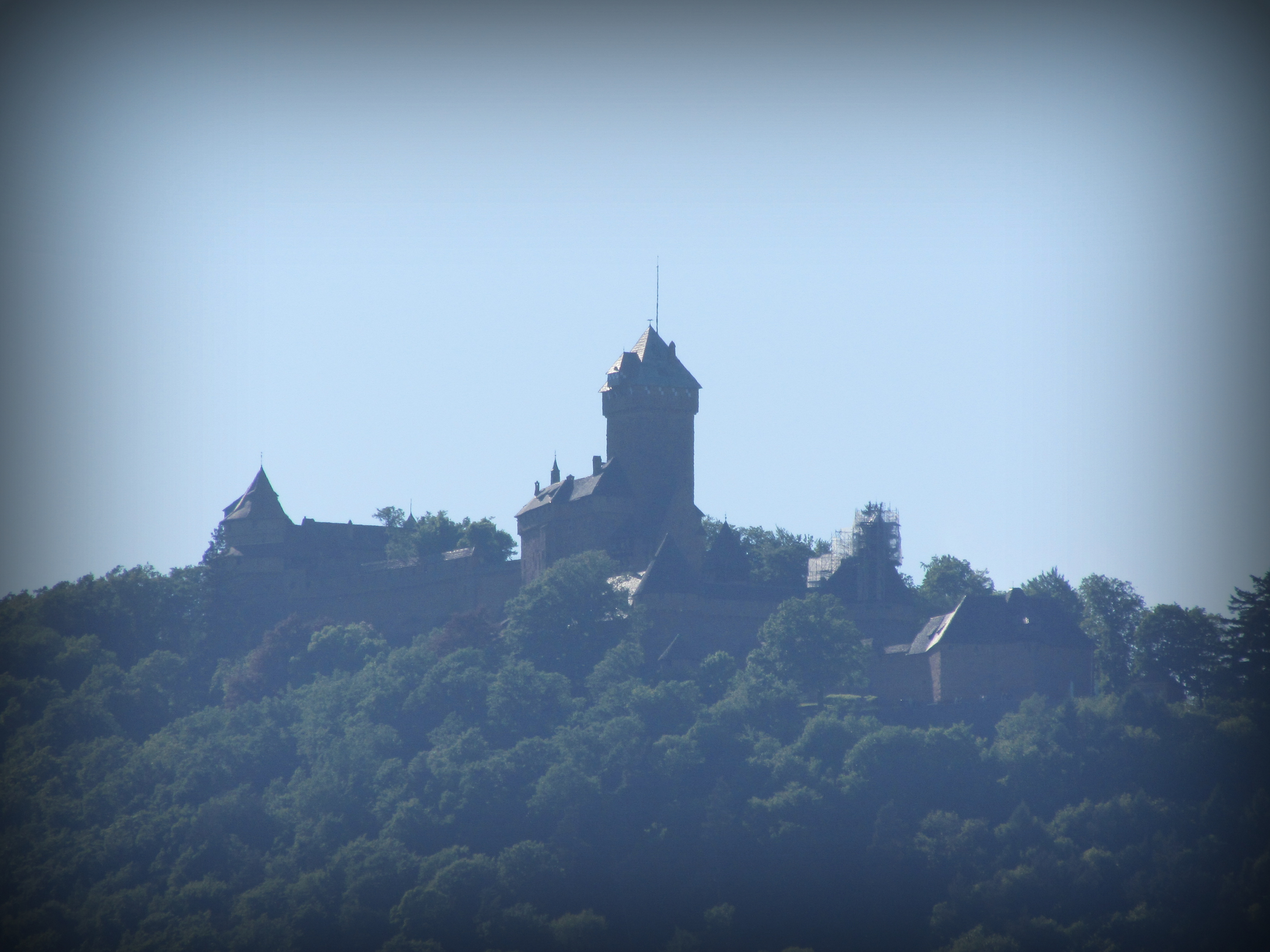 Vue sur le château du Haut-Kœnigsbourg depuis la plaine d'Alsace.